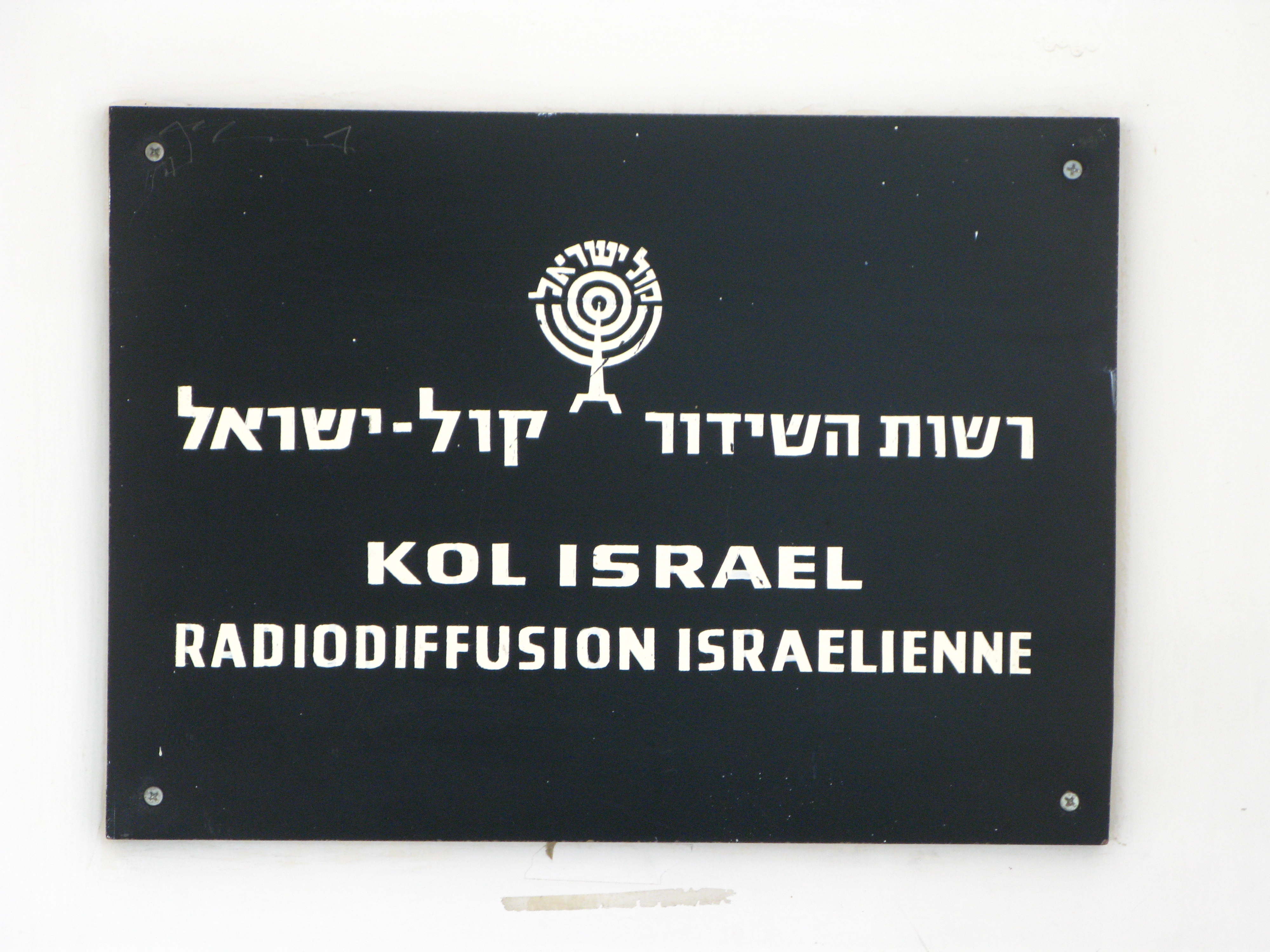 בניין קול ישראל ברחוב הלני המלכה בירושלים, משמש את תחנת הרדיו "קול ישראל" מאז ימי הרדיו המנדטורי ב-1939, ולסגירת רשות השידור.